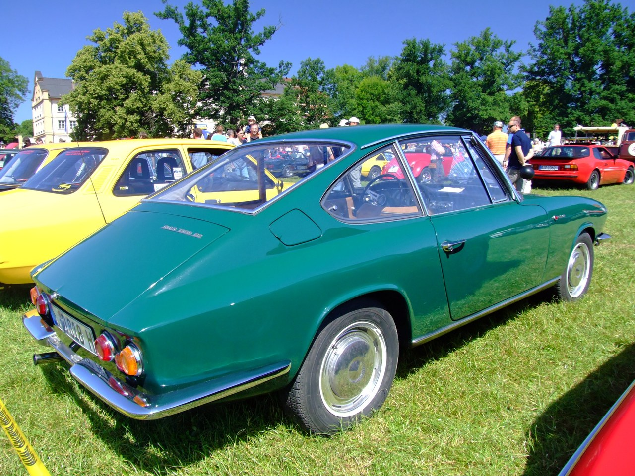 Quelle: selbst fotografiert, 06/2007 Fotograf: Späth Chr.